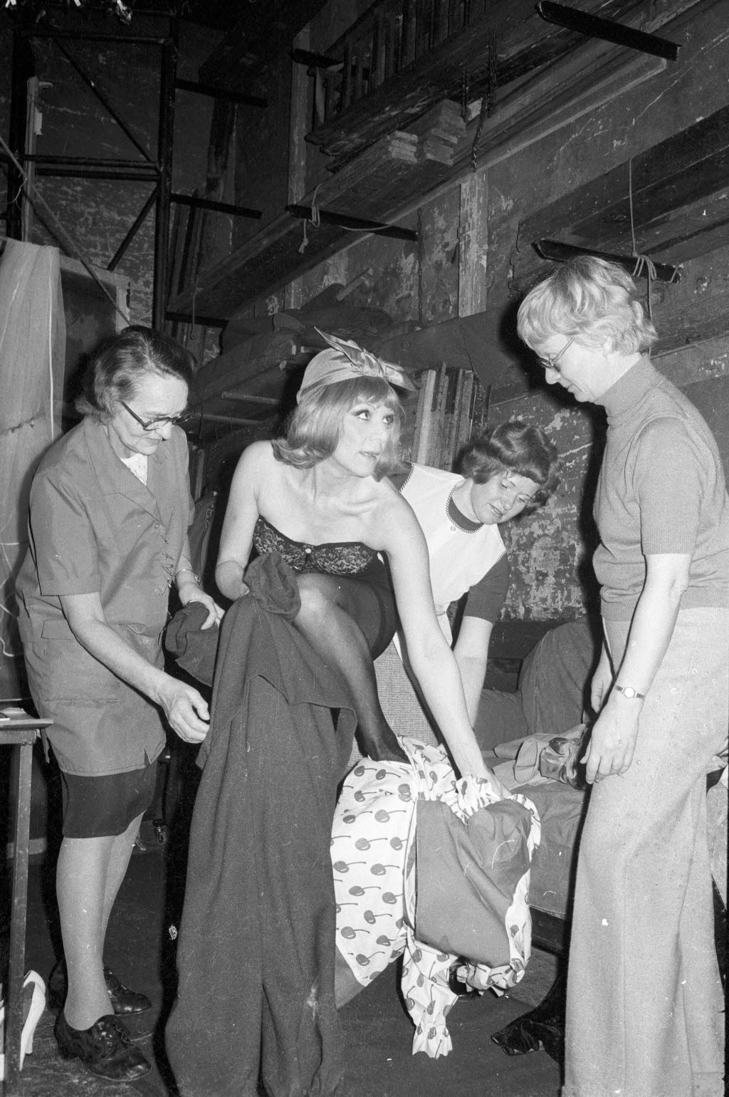 Schauspielerin Ingrid Ohlenschläger (Mitte) übt mit Kostümbildnerin Ilse Grams (rechts) und weiteren Helferinnen das eilige Umziehen, das ihre ständigen Kostümwechsel erfordern.